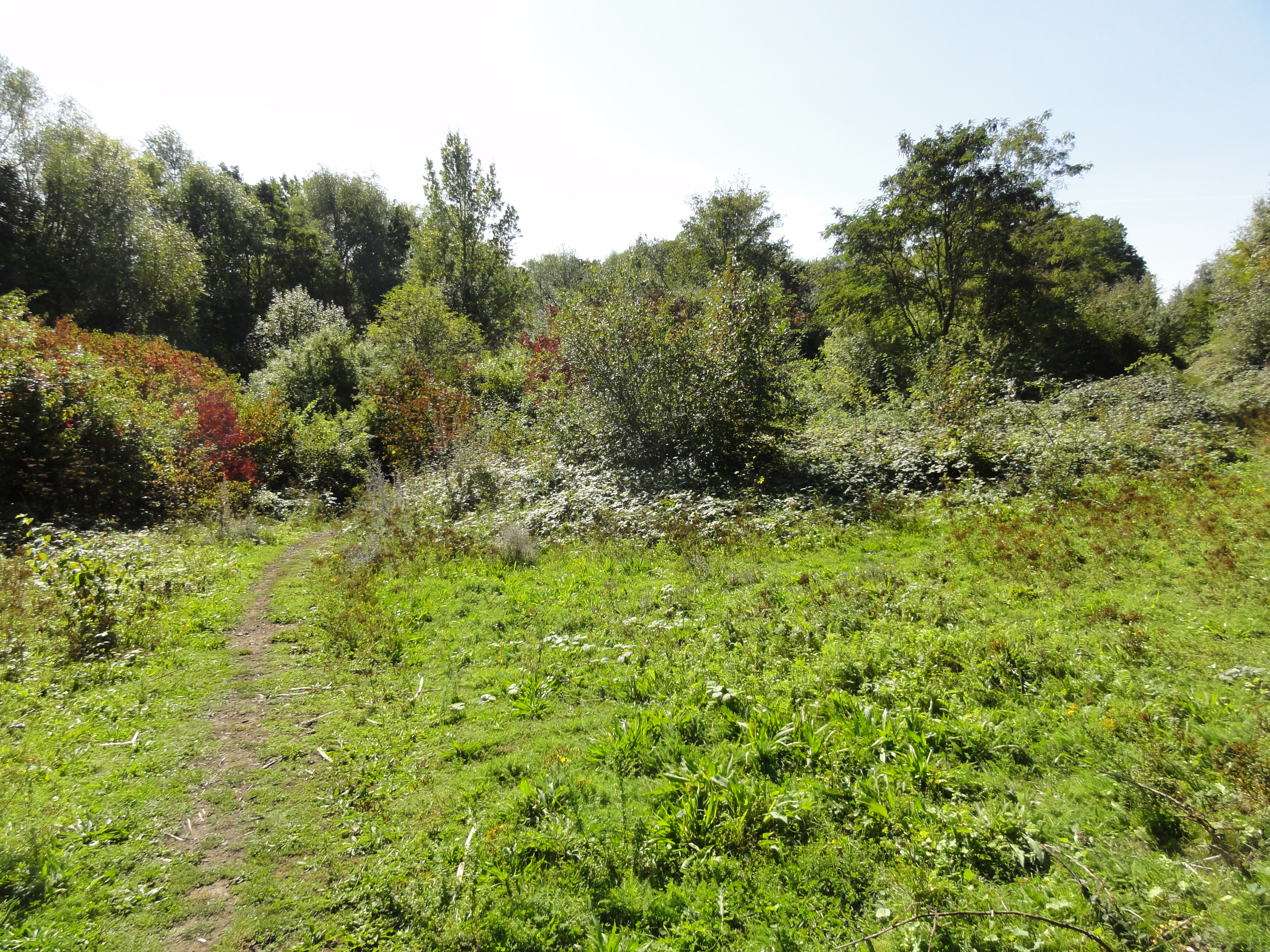 Terril n° 80A dit Garennes Pont Ampère, fosse n° 3 - 3 bis - 3 ter de la Compagnie des mines de Liévin dans le bassin minier du Nord-Pas-de-Calais, Éleu-dit-Leauwette, Pas-de-Calais, Nord-Pas-de-Calais, France.